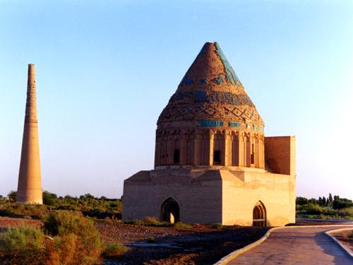 Mausolée du Sultan Tekesh. Kunya Urgench, Turkmenistan.